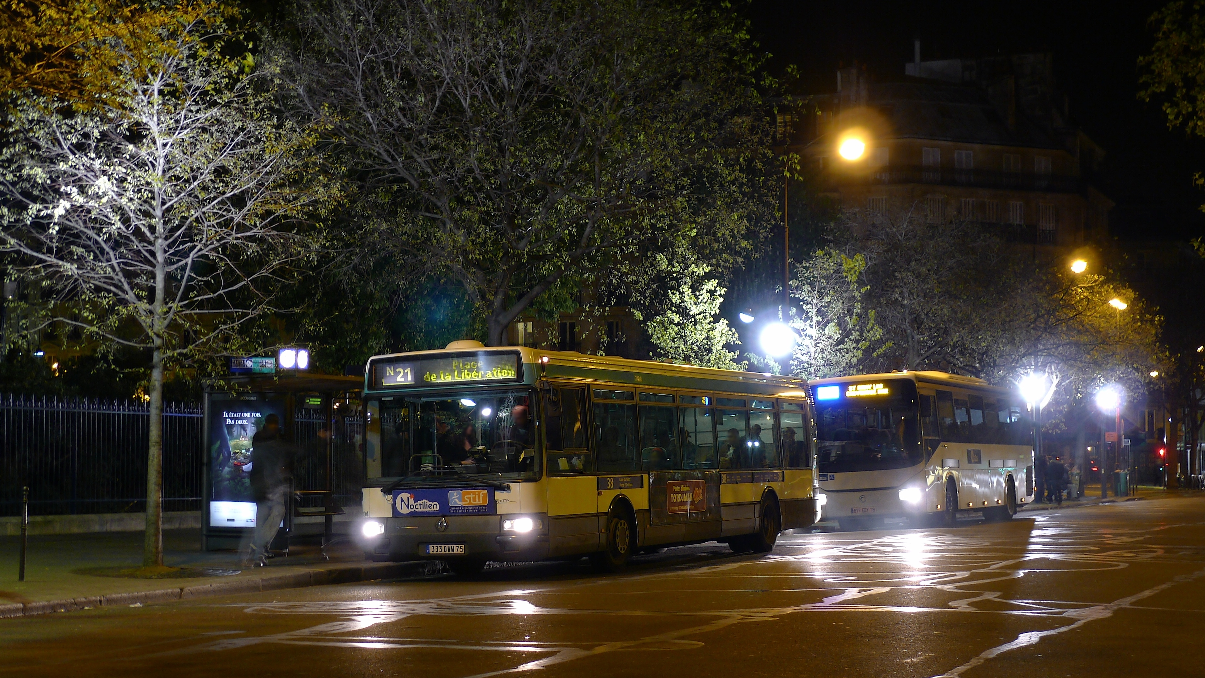 Noctilien Ratp - Renault Agora V2 n°7404 sur le N21 suivi d'un l'Irisbus Arway sur le N122